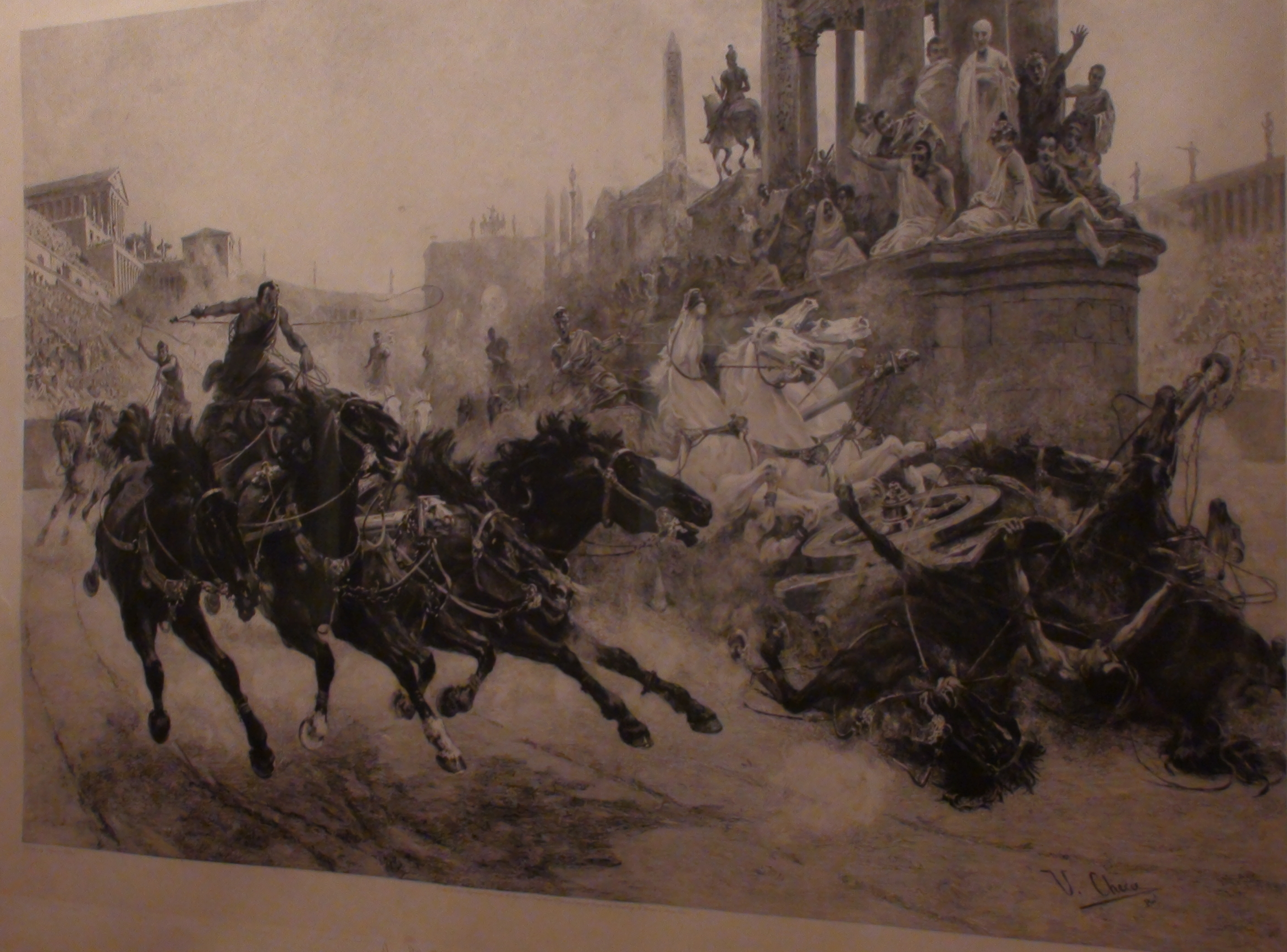 Carrera de carros romanos. Fotograbado sobre papel, 70 X 102cm.